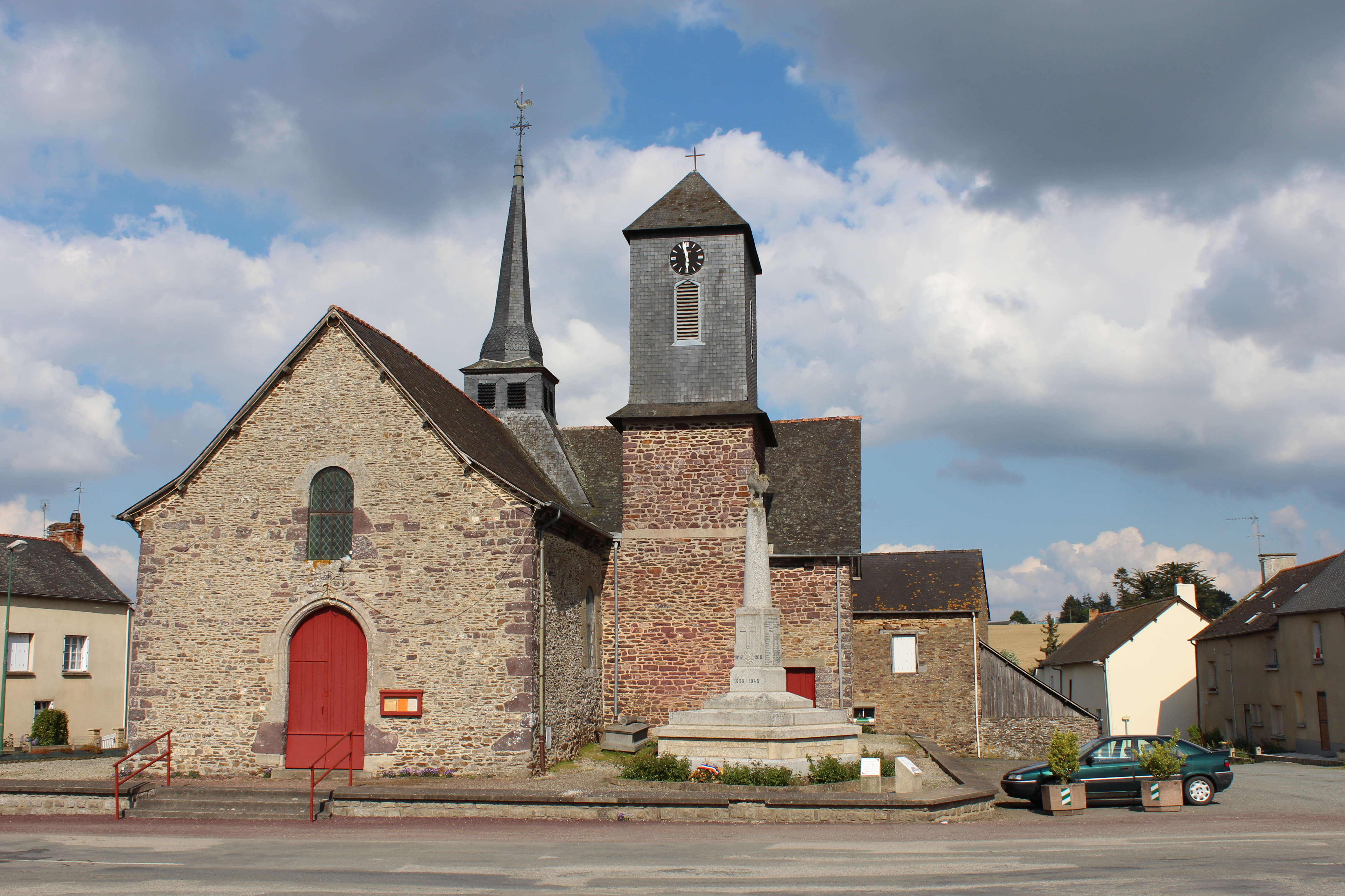 Église de Saint-Maugan.